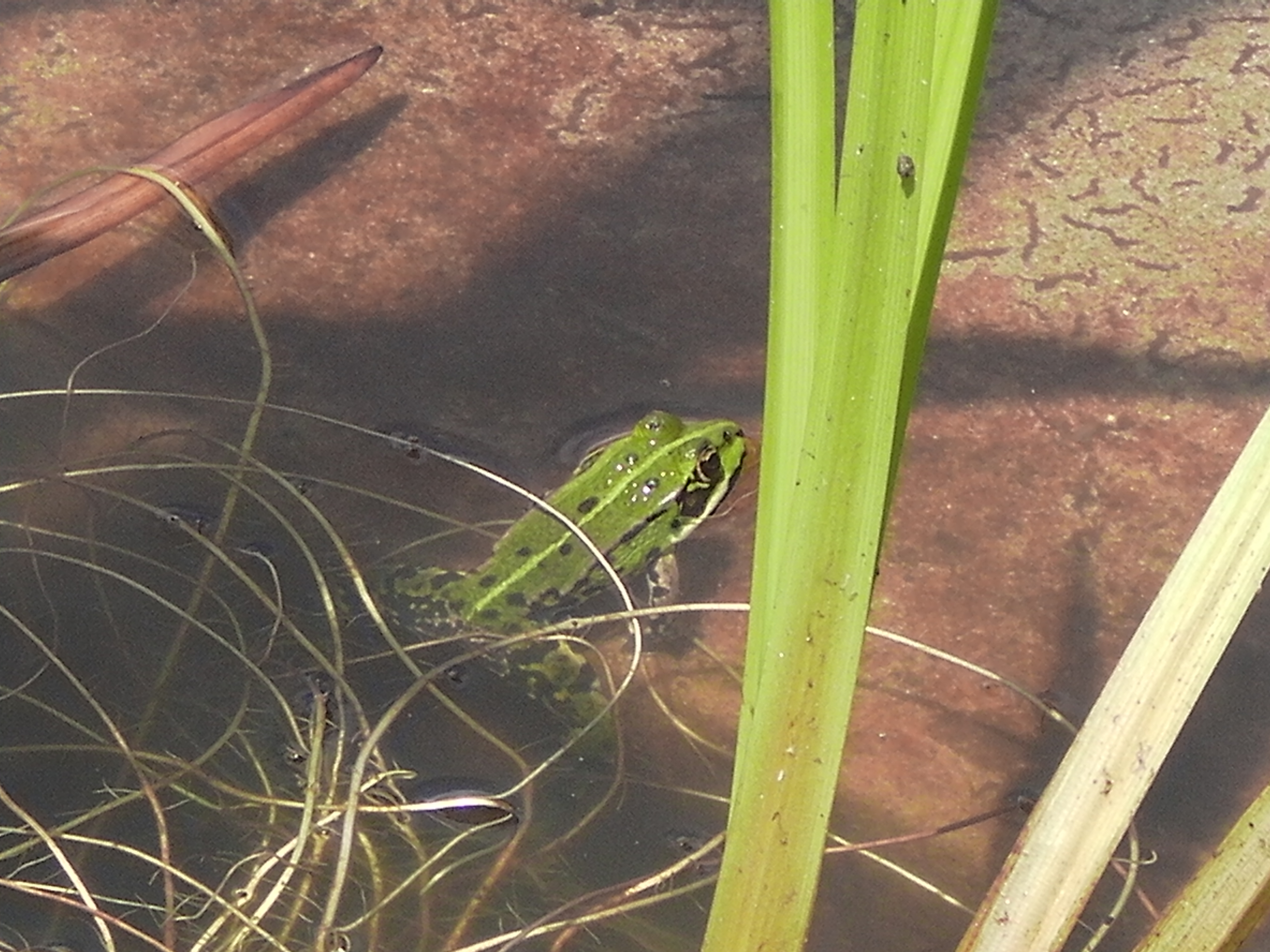 grenouille nageant dans un lavoir en béton qui lui sert de mare